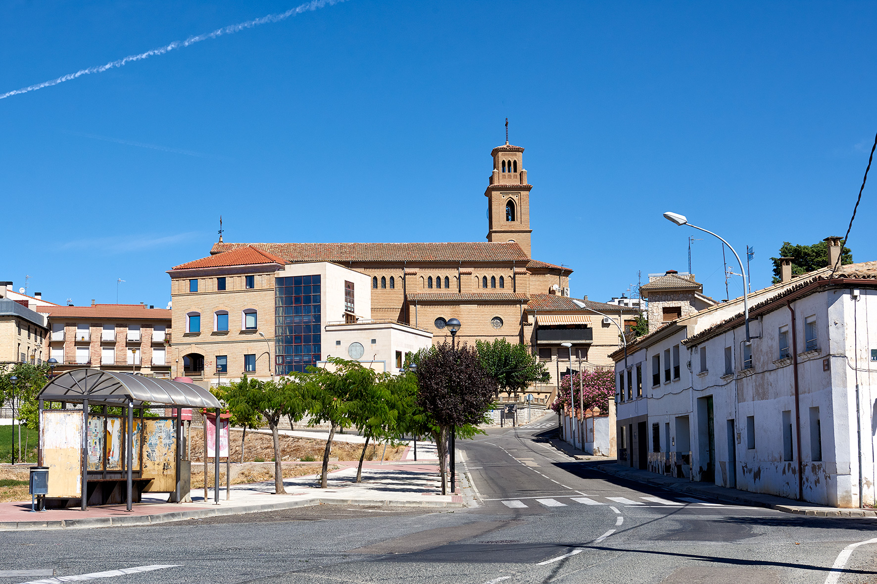 Vista general de Murchante (Navarra)